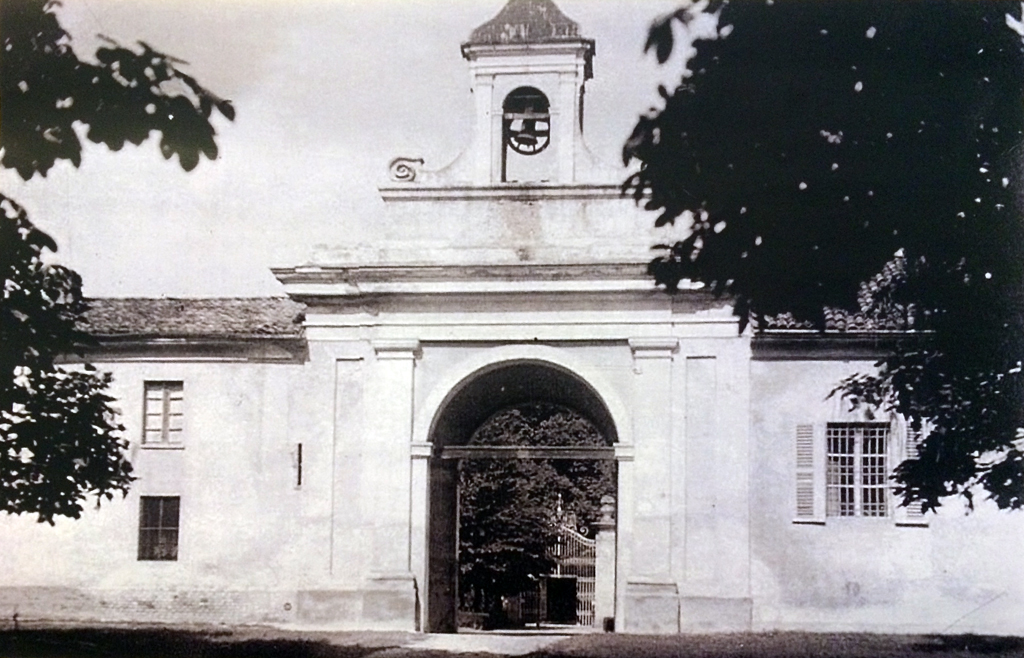 Ingresso principale della Ghilina Grossa di San Giuliano Nuovo (AL), residenza estiva favorita della famiglia Ghilini di Alessandria.